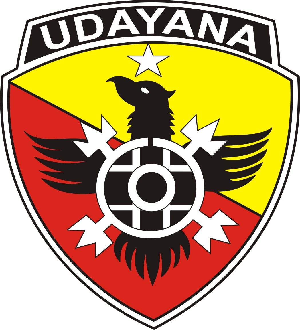 Gambar ini adalah Lambang Kodam IX/Udayana